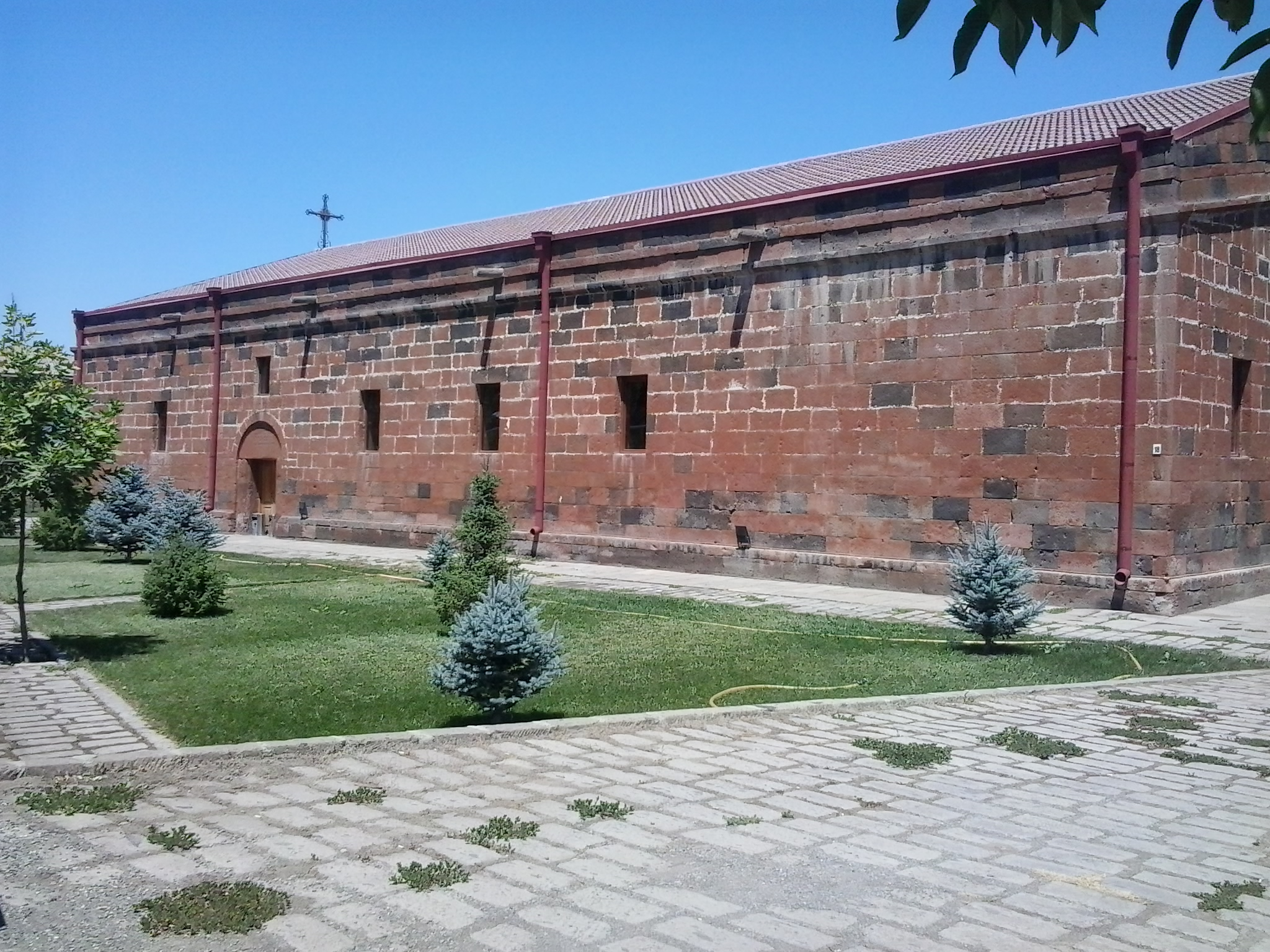 Գտնվում է ՀՀ Արմավիրի մարզի Հոկտեմբեր գյուղում:Կառուցվել է 1882թ. 59/2